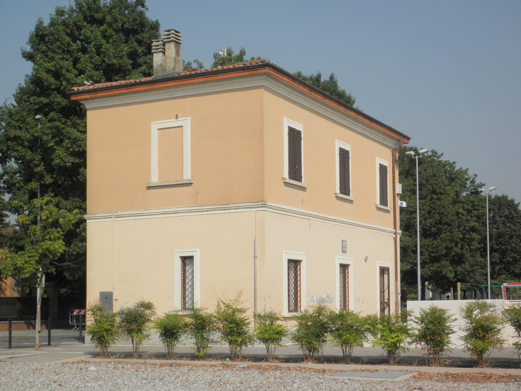 Sesto Cremonese, ex stazione ferroviaria SNFT, lato binari.